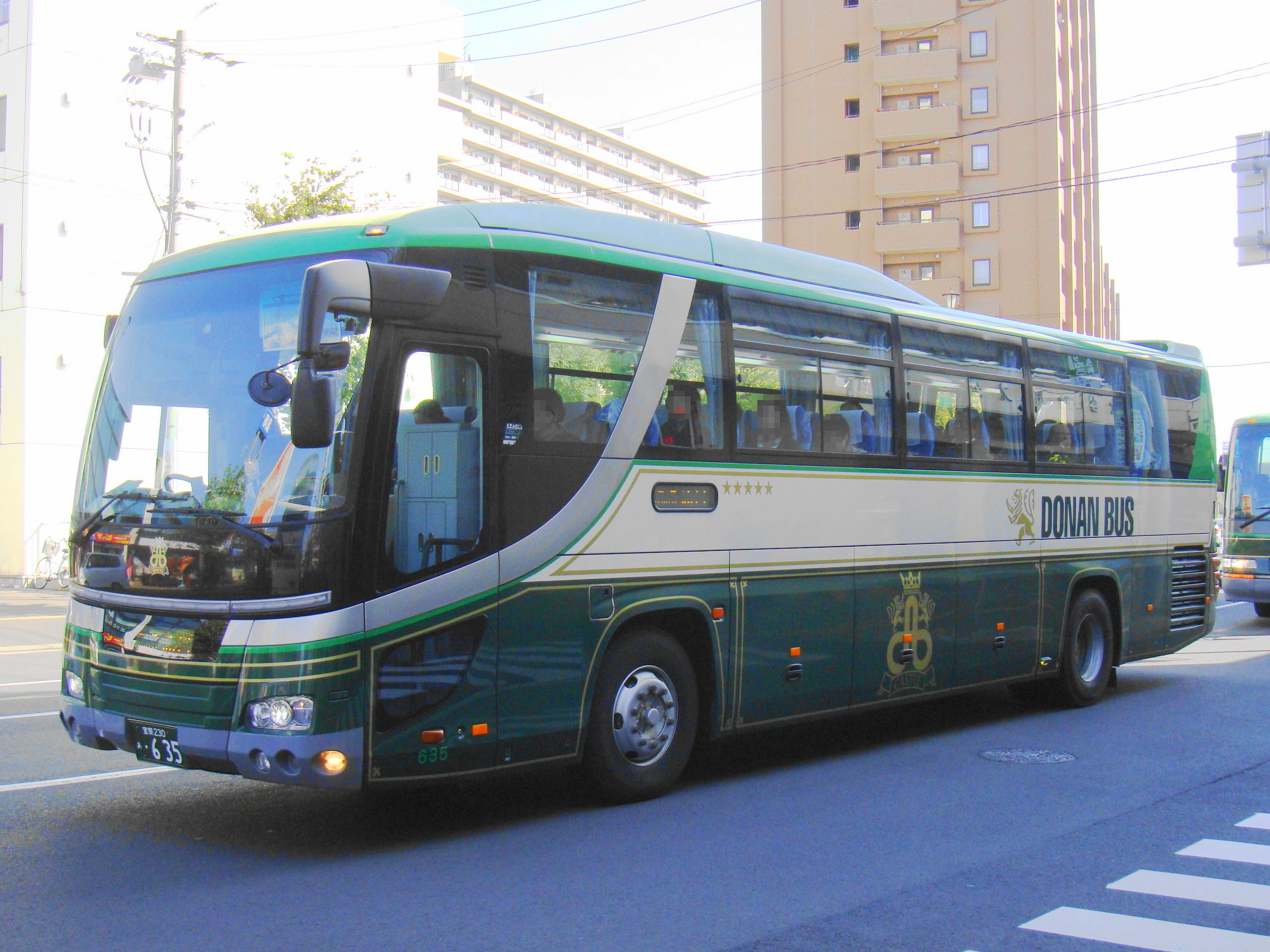 "Kōsoku Pegasus gō" Sapporo to Urakawa